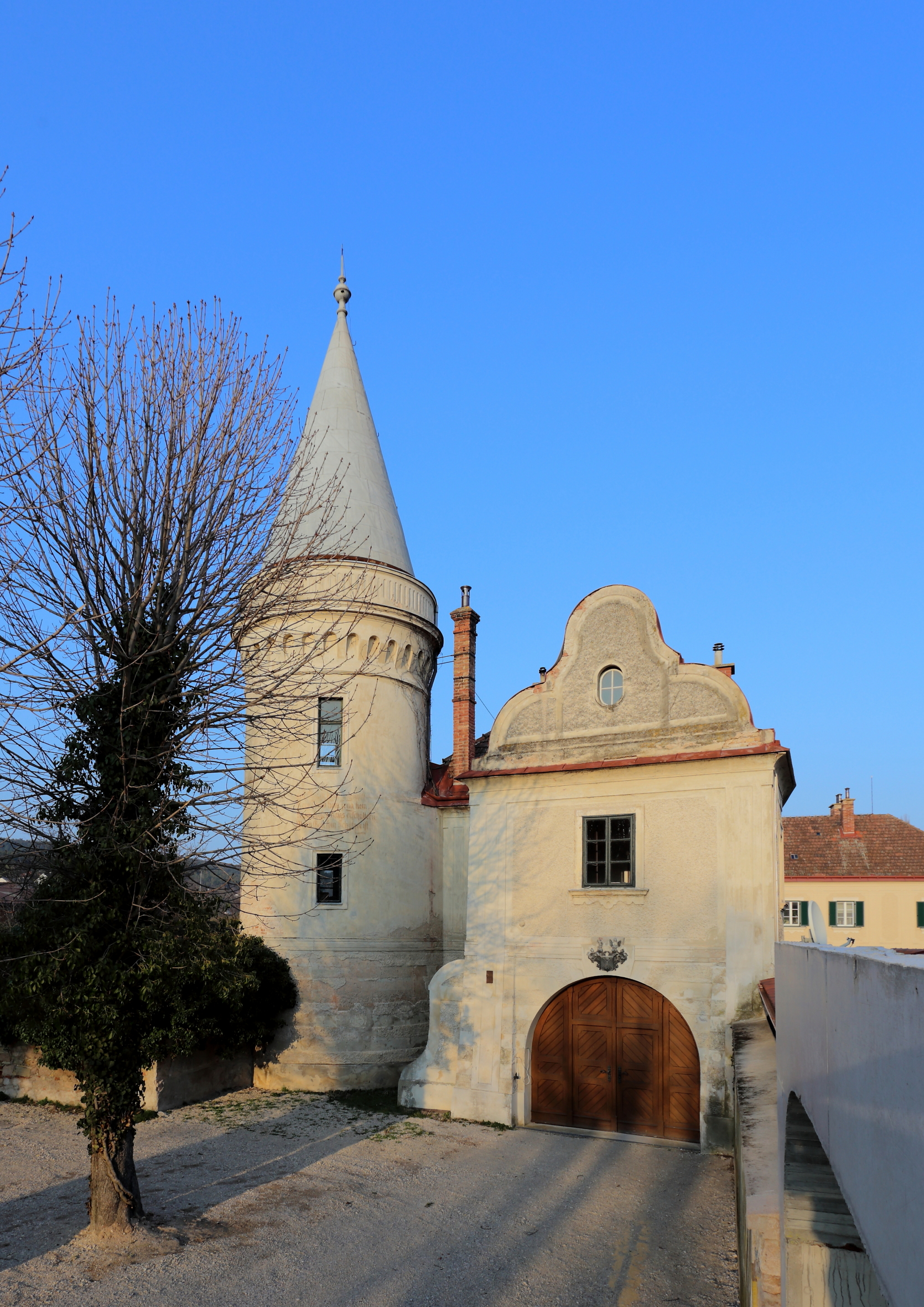 Portal mit Torturm des Schlosses in Brunn an der Schneebergbahn, ein Ortsteil der niederösterreichischen Marktgemeinde Bad Fischau-Brunn.